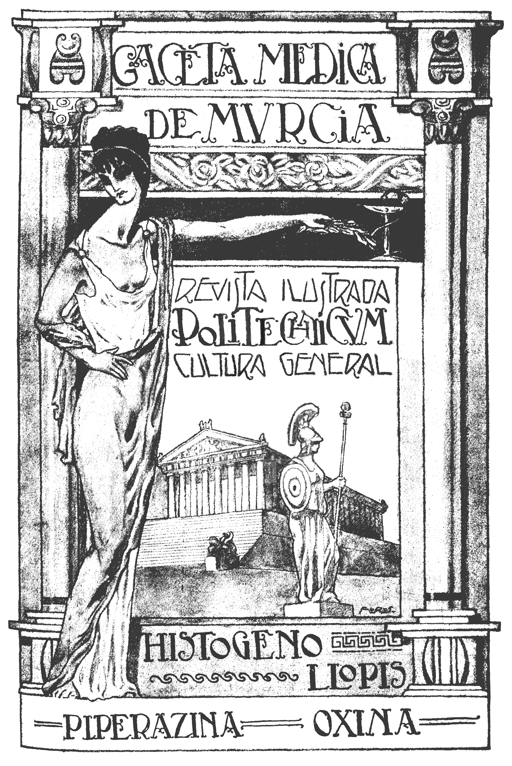 Página nº 3 de la revista Gaceta Médica de Murcia, con la cabecera de la revista de cultura general Polytechnicum; publicada en Murcia el 1 de octubre de 1916 por José Pérez Mateos, como director.